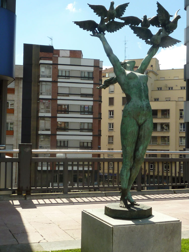 Luis Sanguino. La Losa, Oviedo